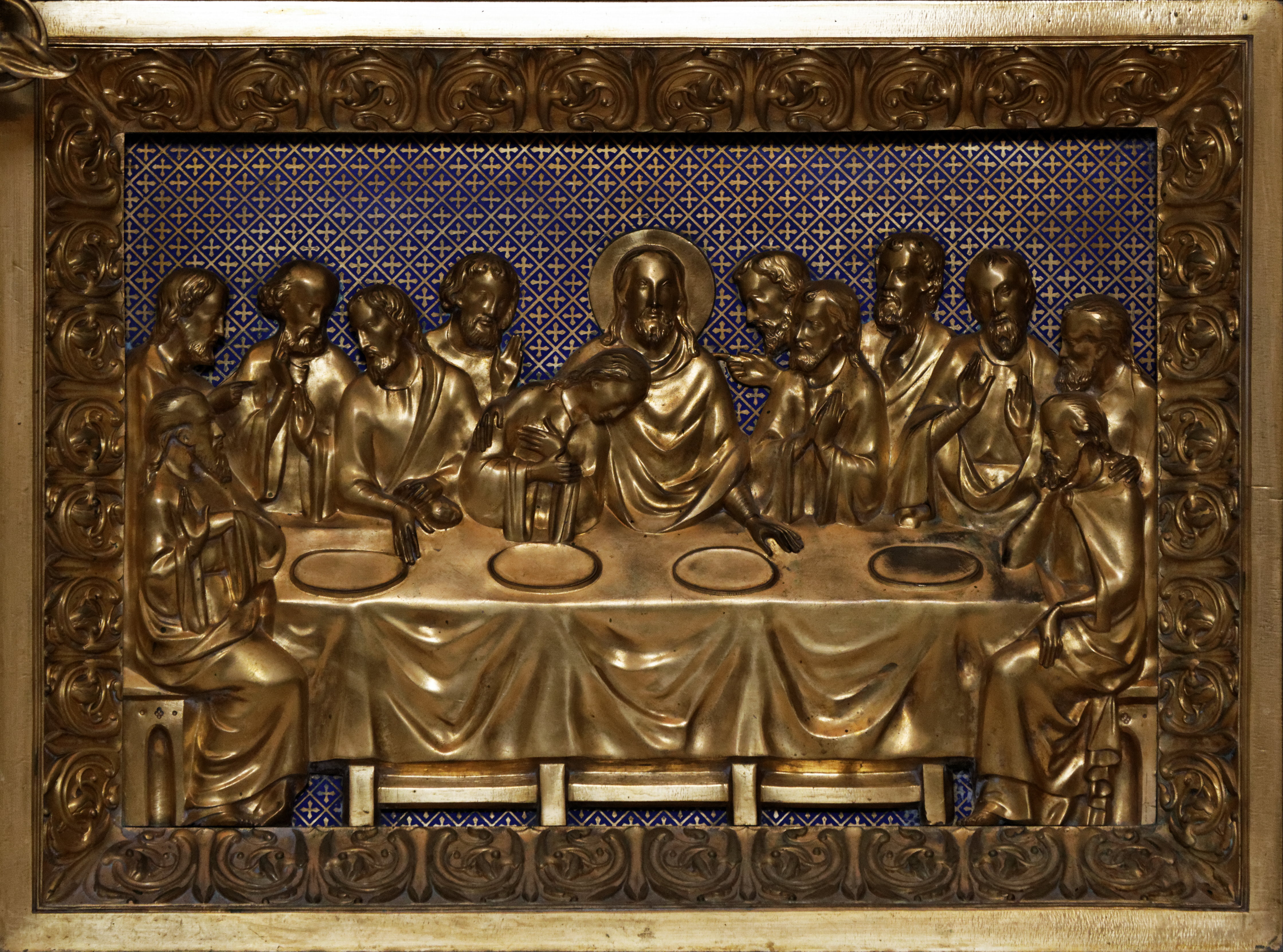 La cathédrale Saint-Corentin à Quimper dans le Finistère.